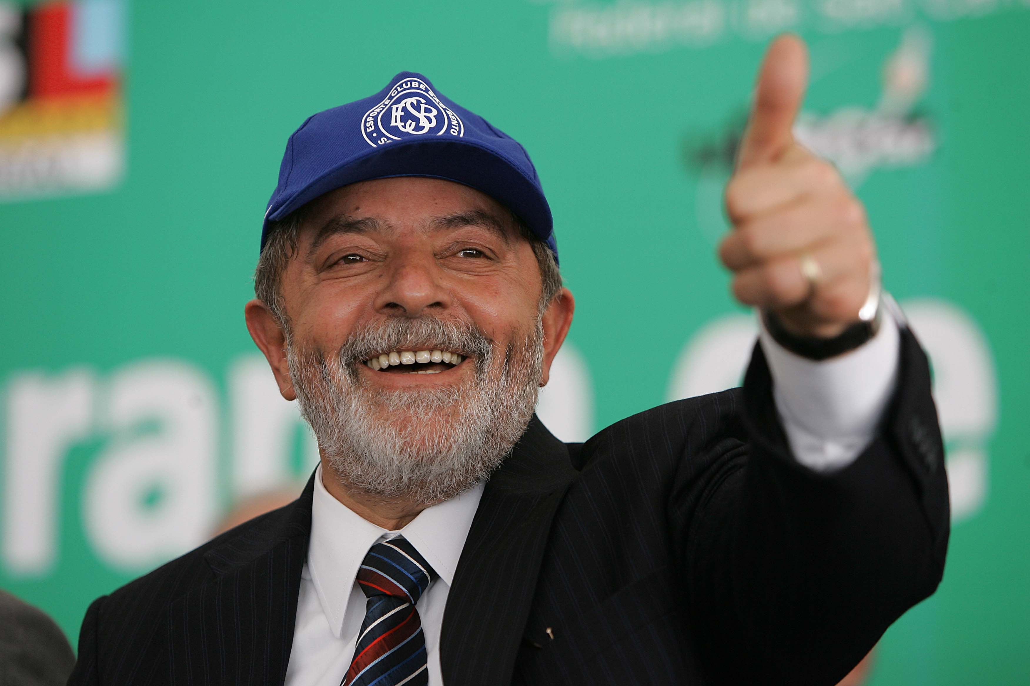 Sorocaba (SP) - Presidente Lula acena para populares presentes à cerimônia que marca o início das obras da Universidade Federal de São Carlos - Ufscar.